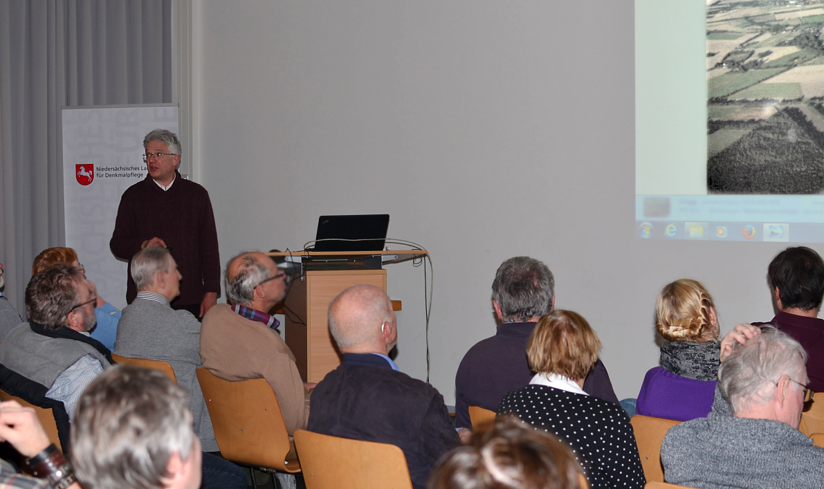 Luftbildschau der Luftbild AG des Freundeskreis für Archäologie in Niedersachsen im Niedersächsischen Landesamt für Denkmalpflege, Vortrag durch den Leiter der Luftbild AG Heinz-Dieter Freese